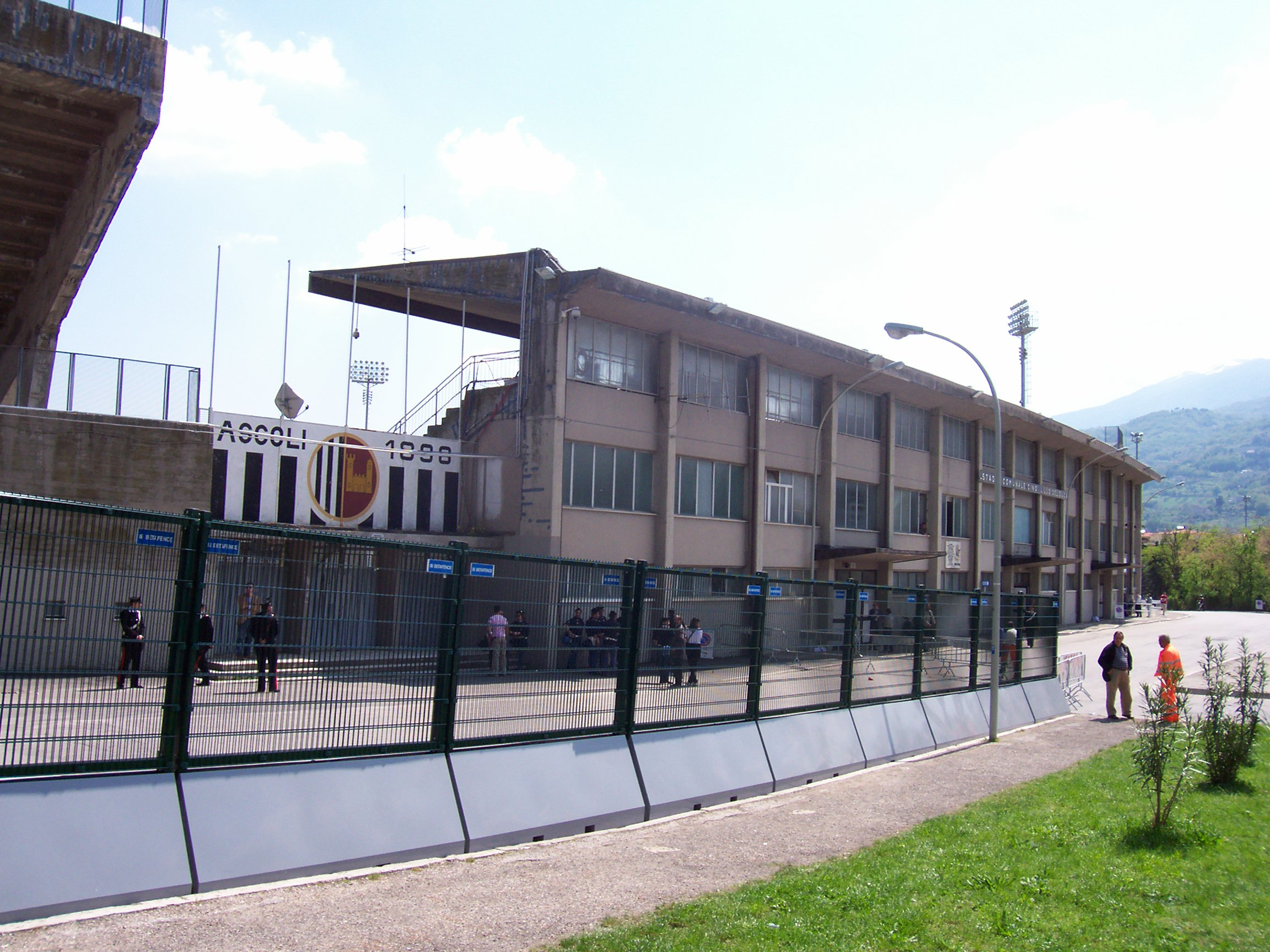 Stadio Cino e Lilllo Del Duca, Ascoli Piceno, 22/04/2006